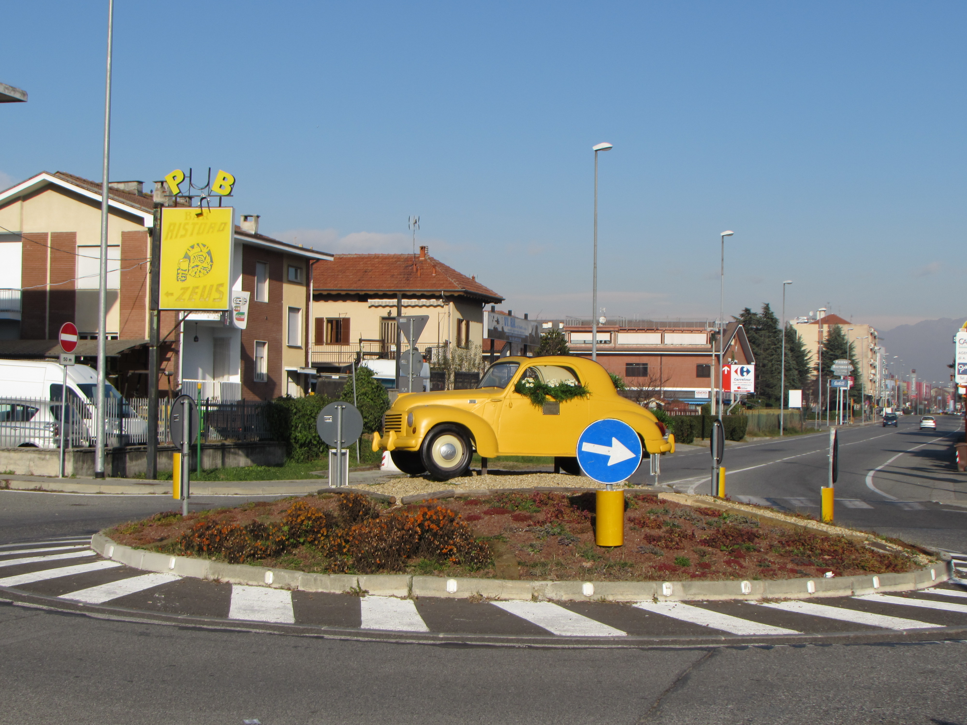 La 500 Topolino sulla rotonda